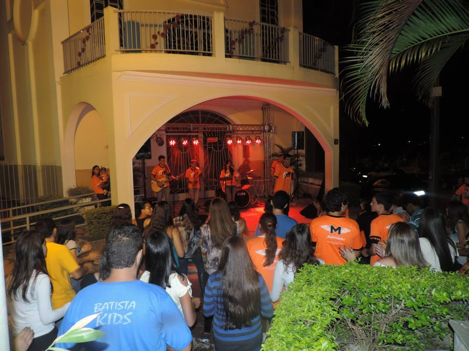 event "abala cetenario"